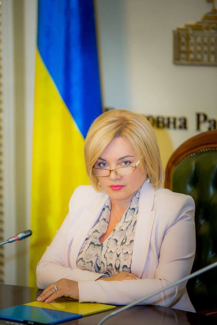 Фото Оксани Білозір